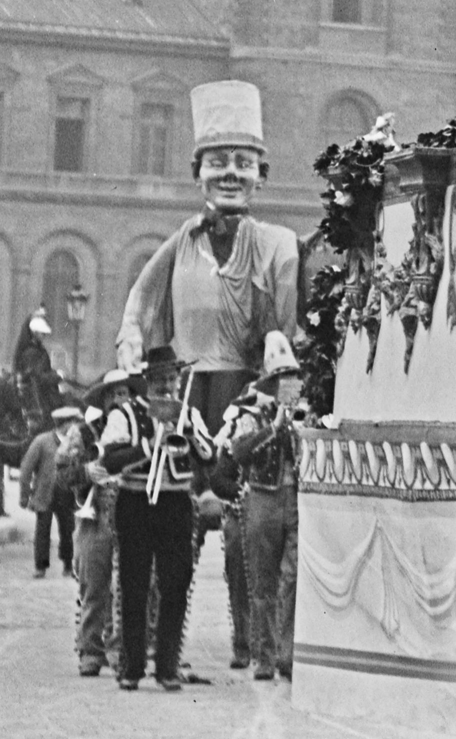 Un géant suit le char de la Rose des Roses dans son cortège parisien le jeudi de la Mi-Carême 14 mars 1912..